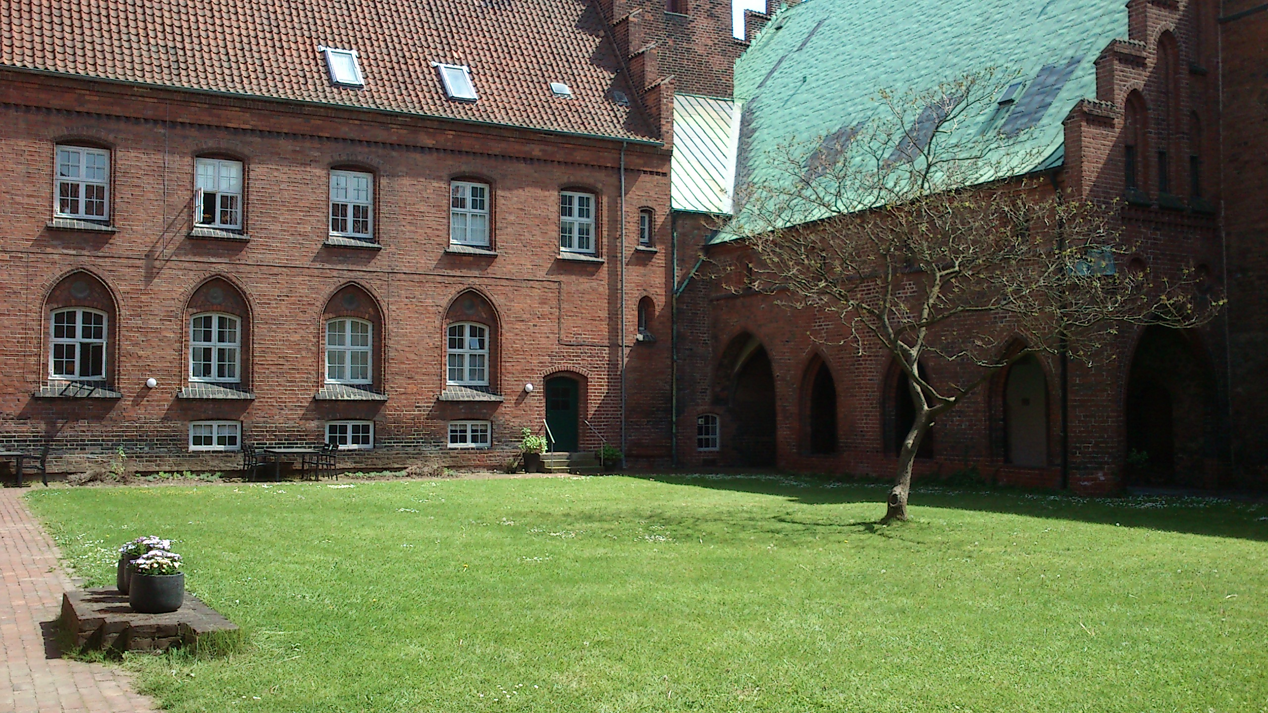 Klosterhaven 'Fratergården' i Vor Frue Kloster.